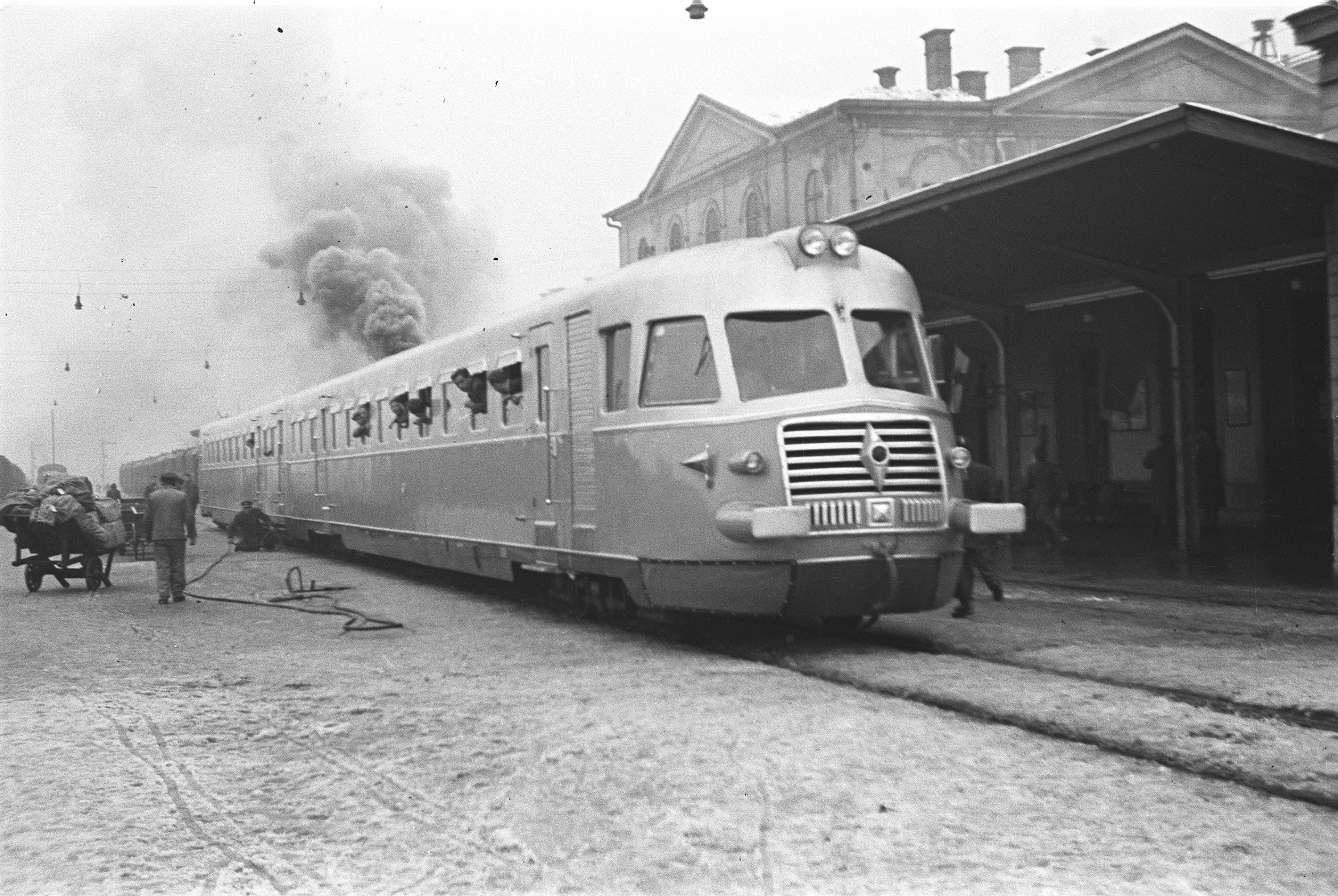 Novi motorni vlak delavnice vozil Boris Kidrič v Mariboru na prvi poskusni vožnji.